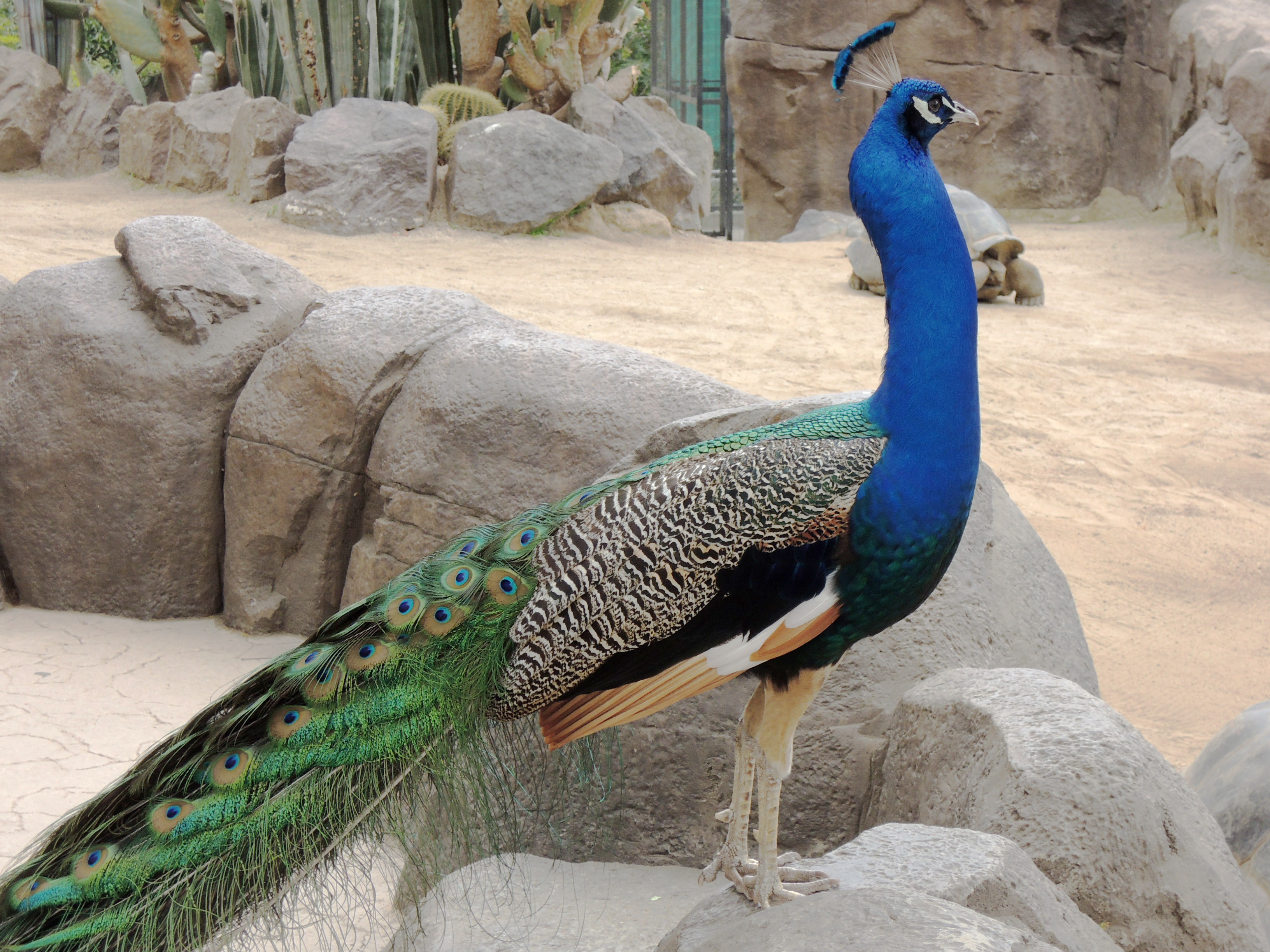 Paon bleu (Pavo cristatus) au zoo de San Diego.